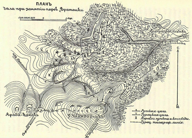 позициите при Врачешки превал